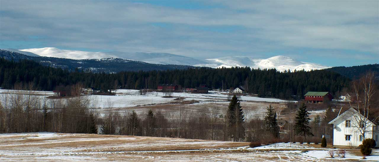 Norefjell sett fra Sokna